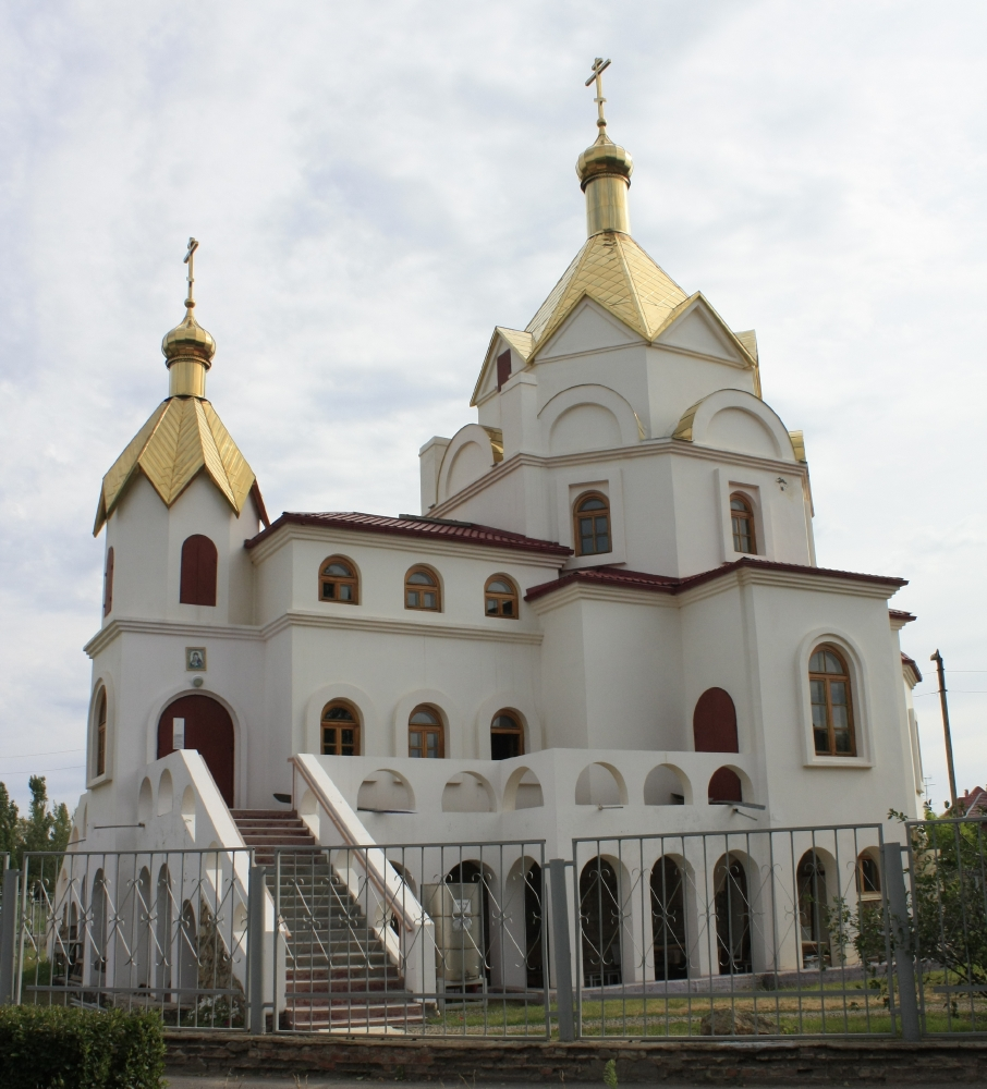 Православный храм Донской Иконы Божией Матери в Волгодонске